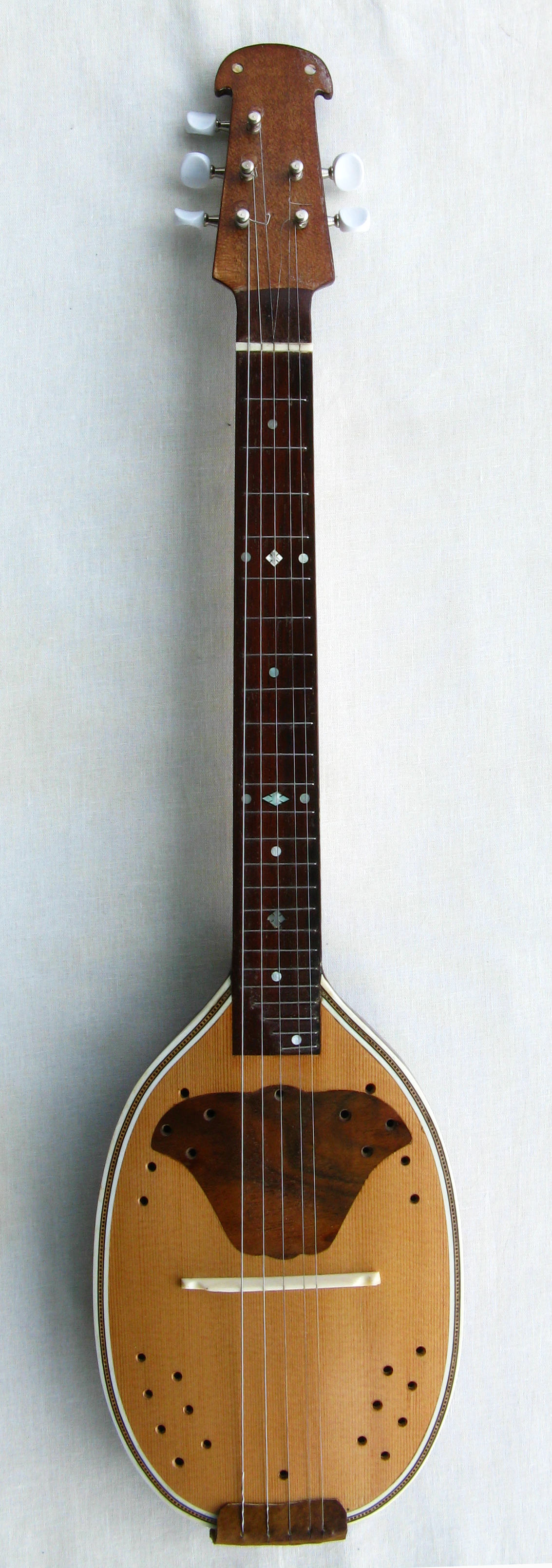 Tambura, a Hungarian instrument used in tambura ensembles. (Hungarian: Prímtambura, Serbian (Vojvodina) / Croatian (Slavonia): tamburica or bisernica)